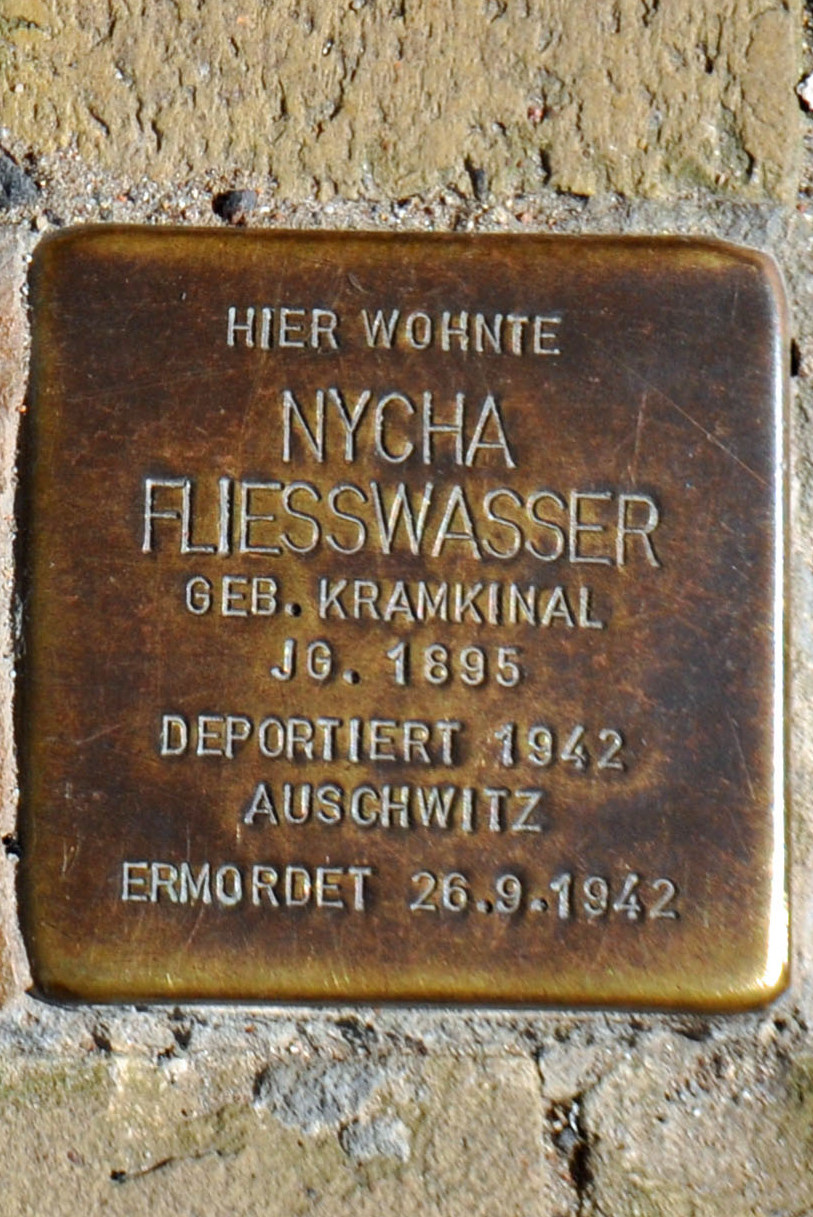 Stolperstein für Nycha Fliesswasser in Stralsund.